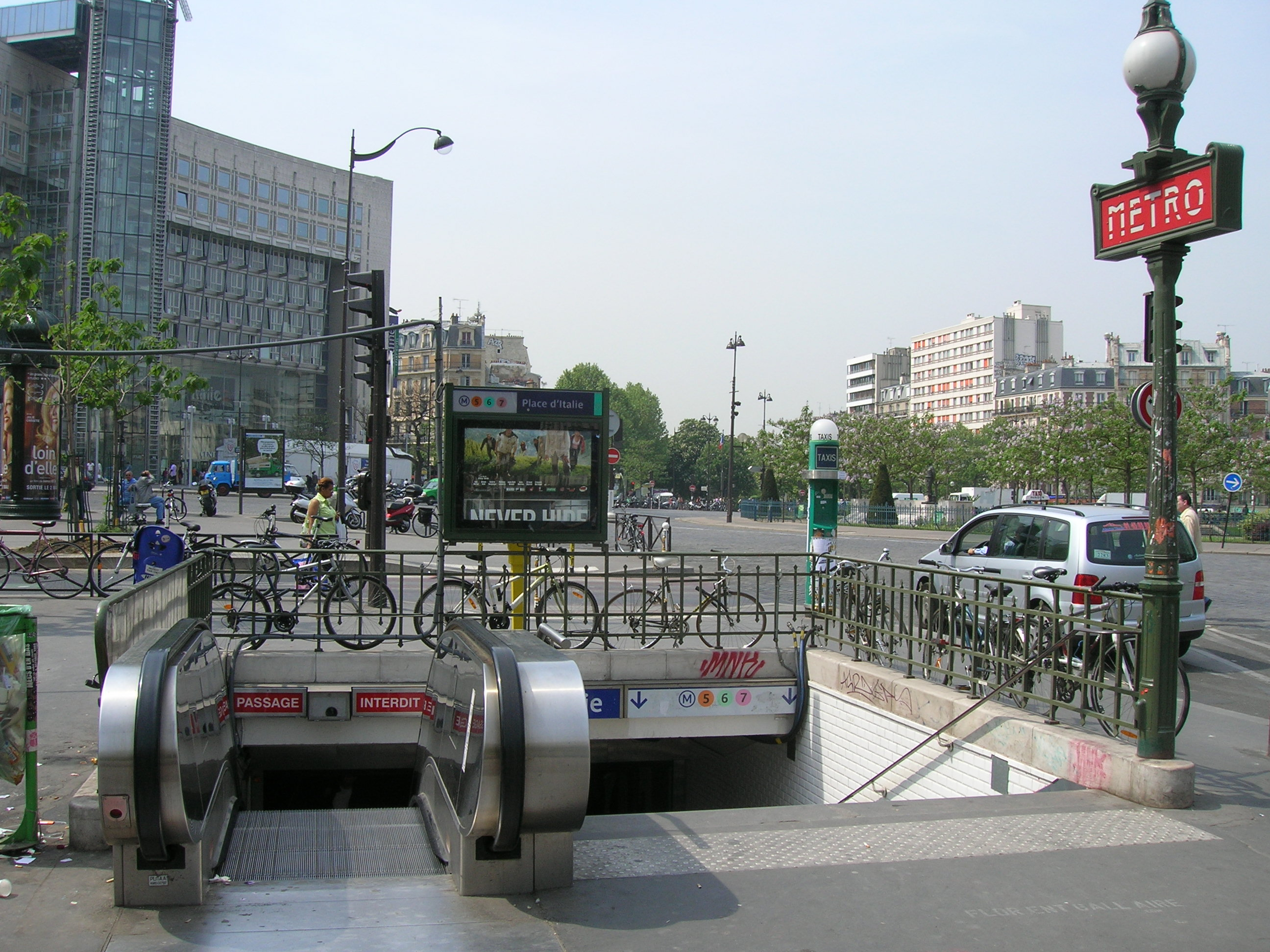 Accès de la station Place d'Italie, Paris